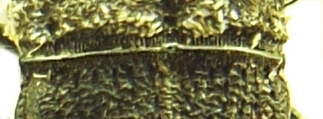 Acmaeoderella flavofasciata, Basis der Flügeldecken ohne Schildchen